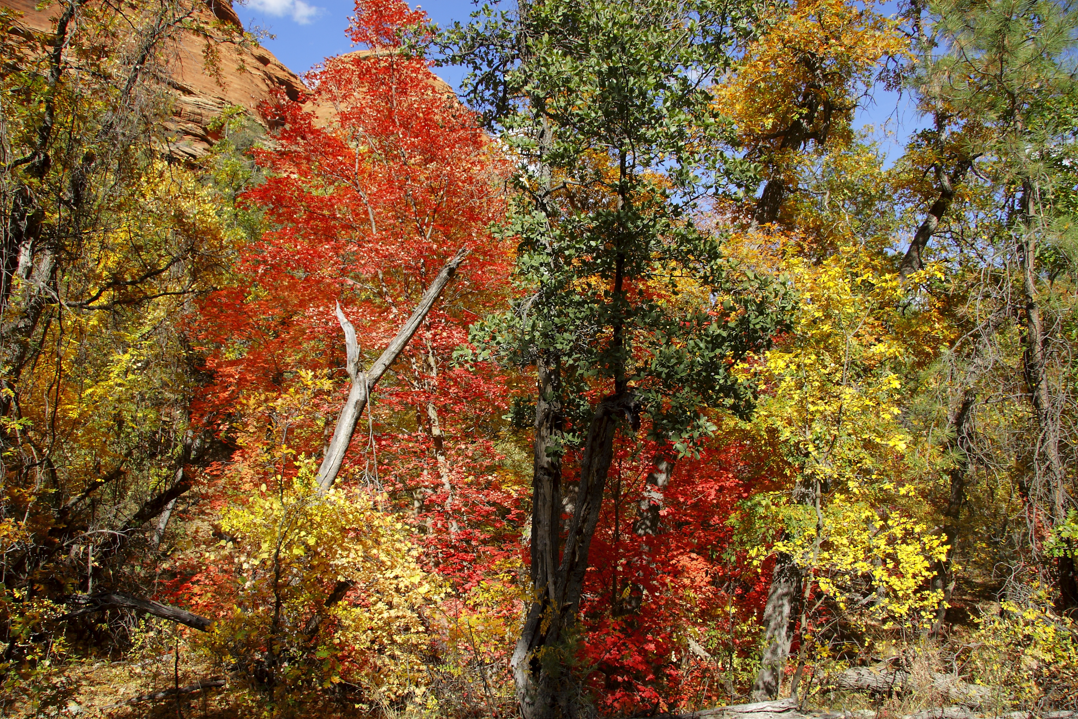 Boynton Canyon Trail, near Sedona Arizona